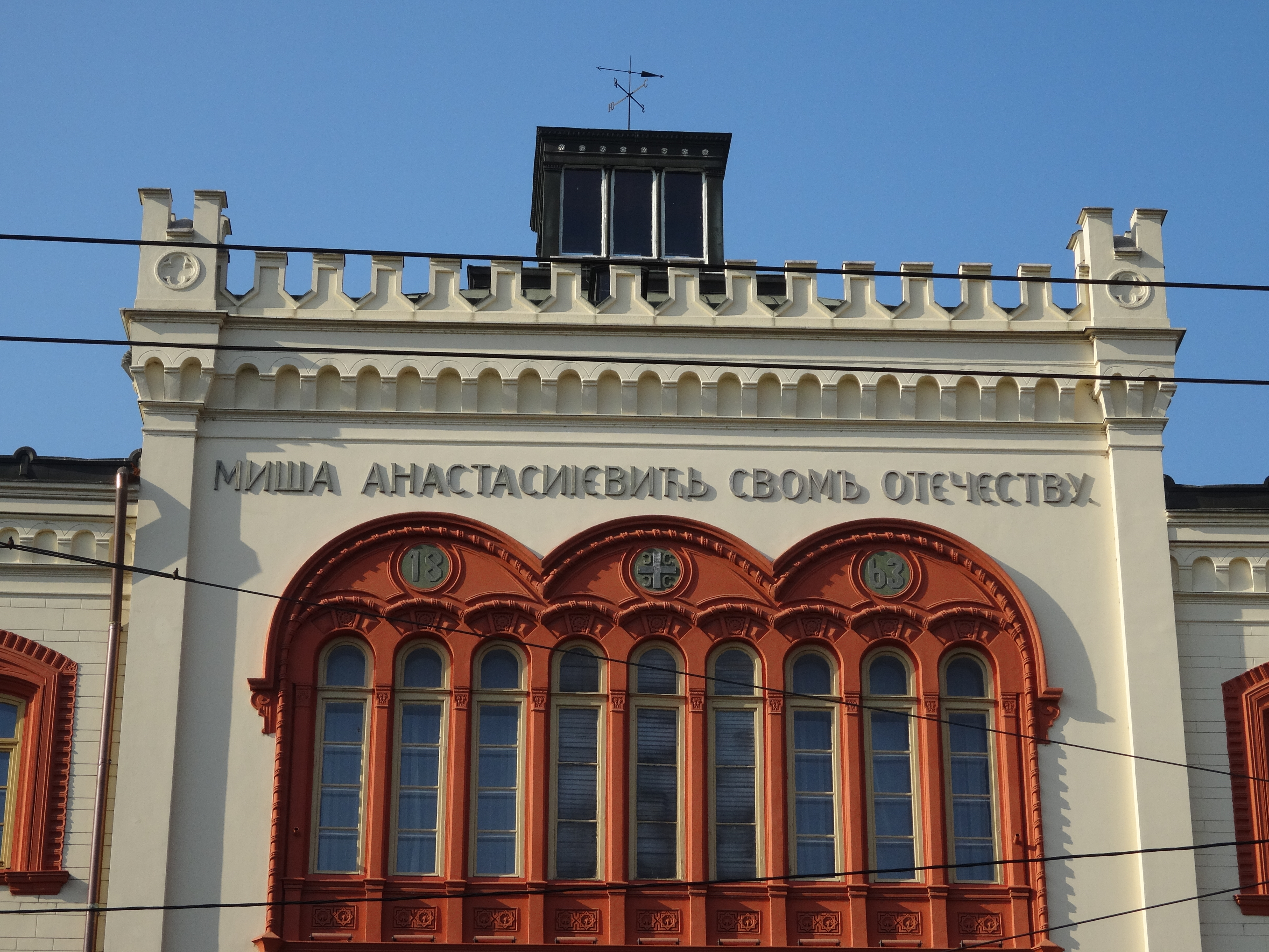 Kapetan Mišino zdanje u Beogradu